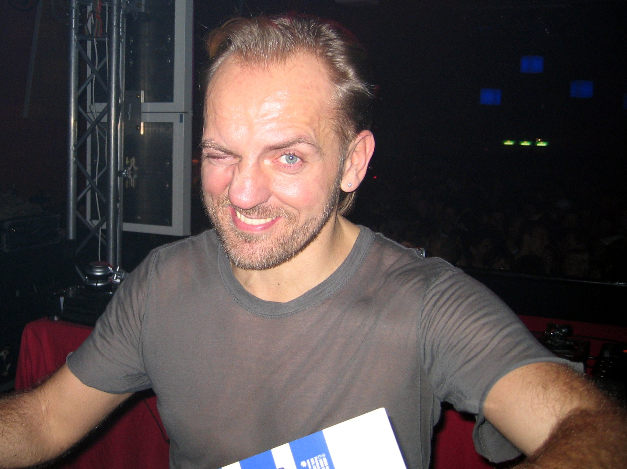 German DJ Sven Väth (2006 in Munich)